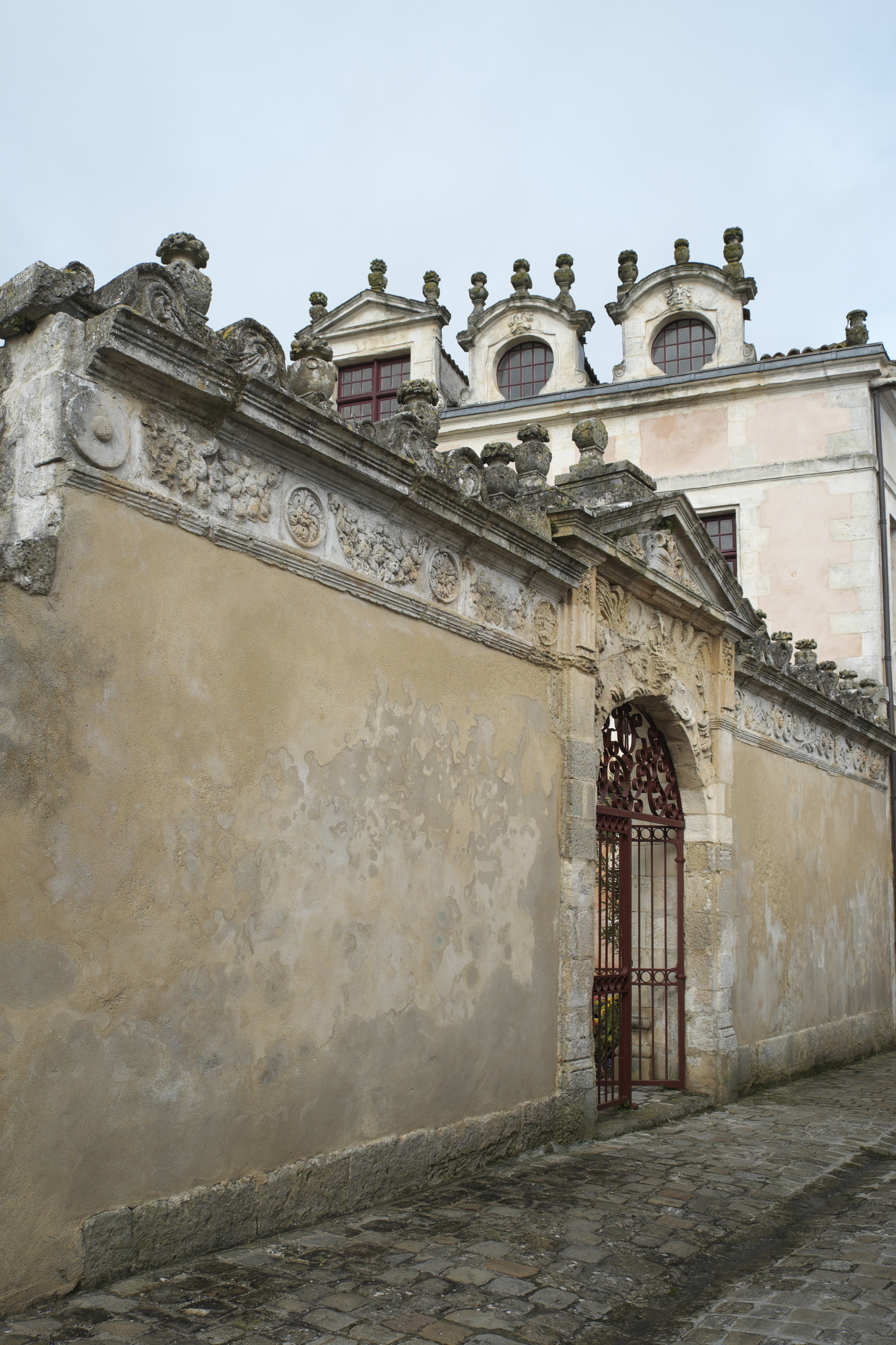 Hôtel des Rohan in Soubise im Département Charente-Maritime (Nouvelle-Aquitaine/Frankreich), heute Hôtel de ville (Rathaus); Mauer mit Portal